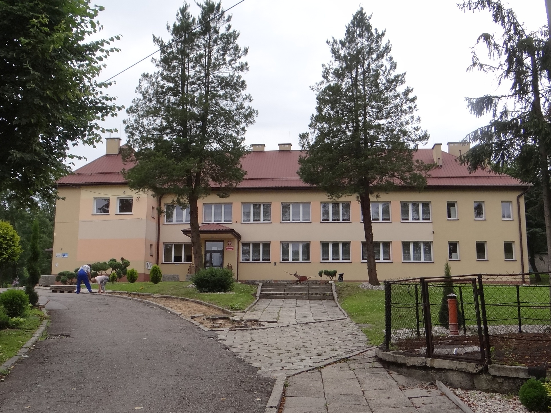 Szkoła w Buchcicach